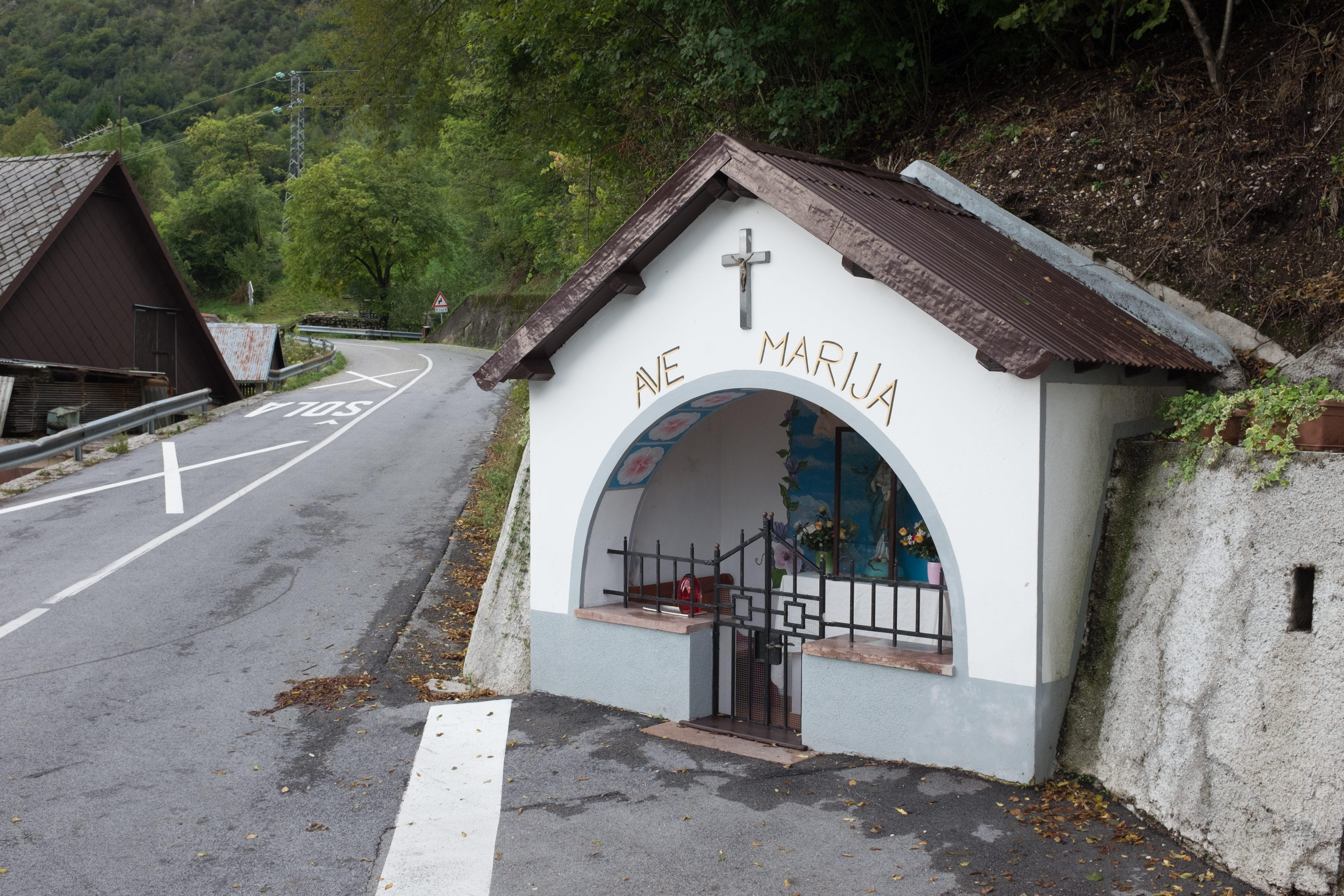 Zaga